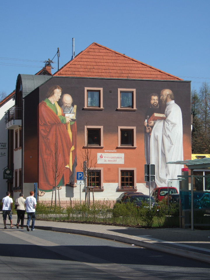 Riefer/Thome: Albrecht Dürer - Die vier Apostel - Wandmalerei in St. Wendel